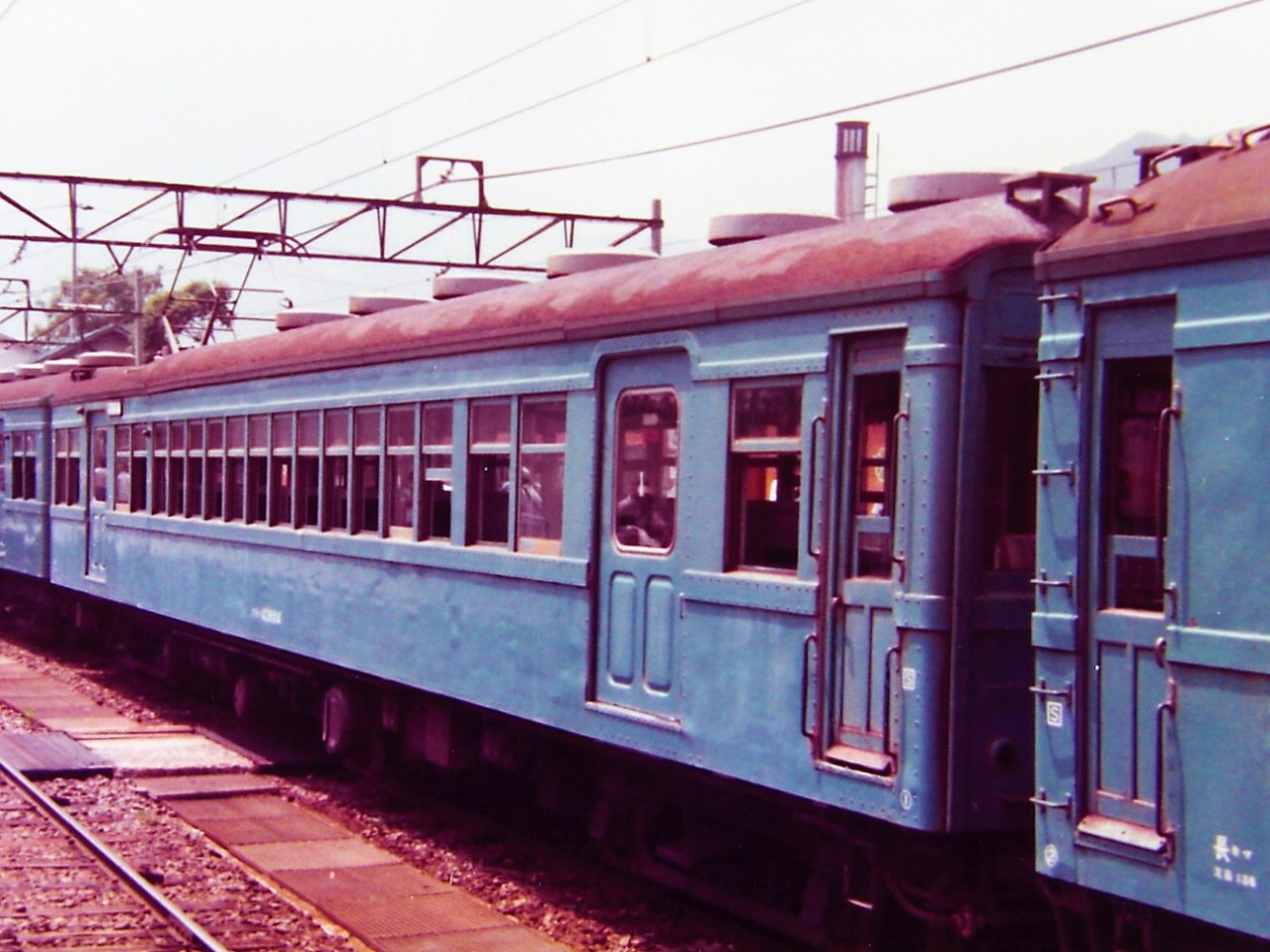 国鉄42系電車 クモハ43804